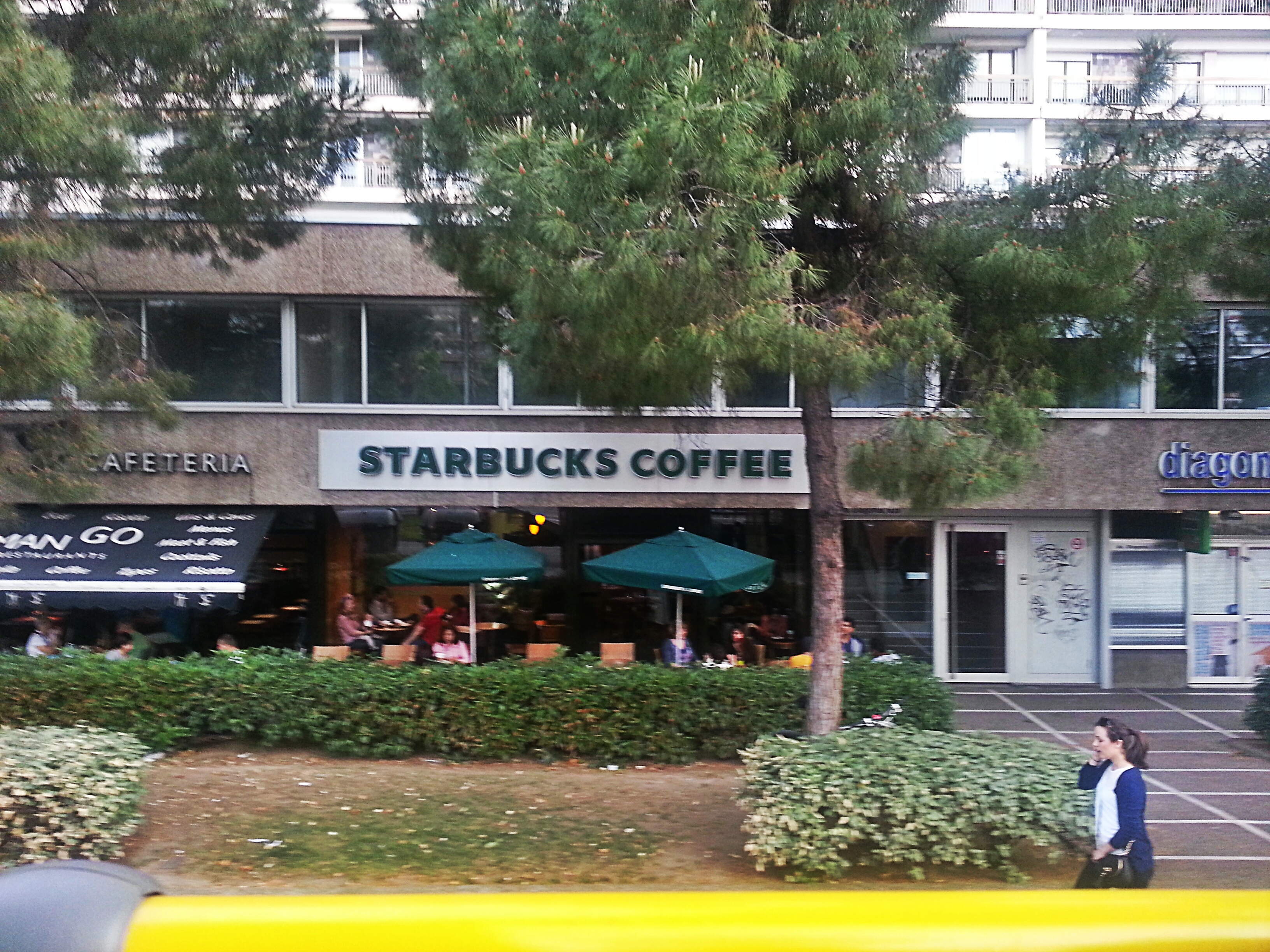 Avinguda Diagonal, 635. Кафе Старбакс в Барселоне